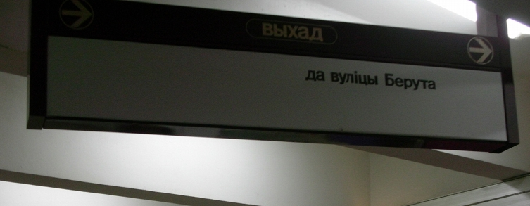 Zdjęcie kierunkowskazu w przejściu podziemnym w Mińsku na Białorusi. Autor zdjęcia: Jstrzelczyk.